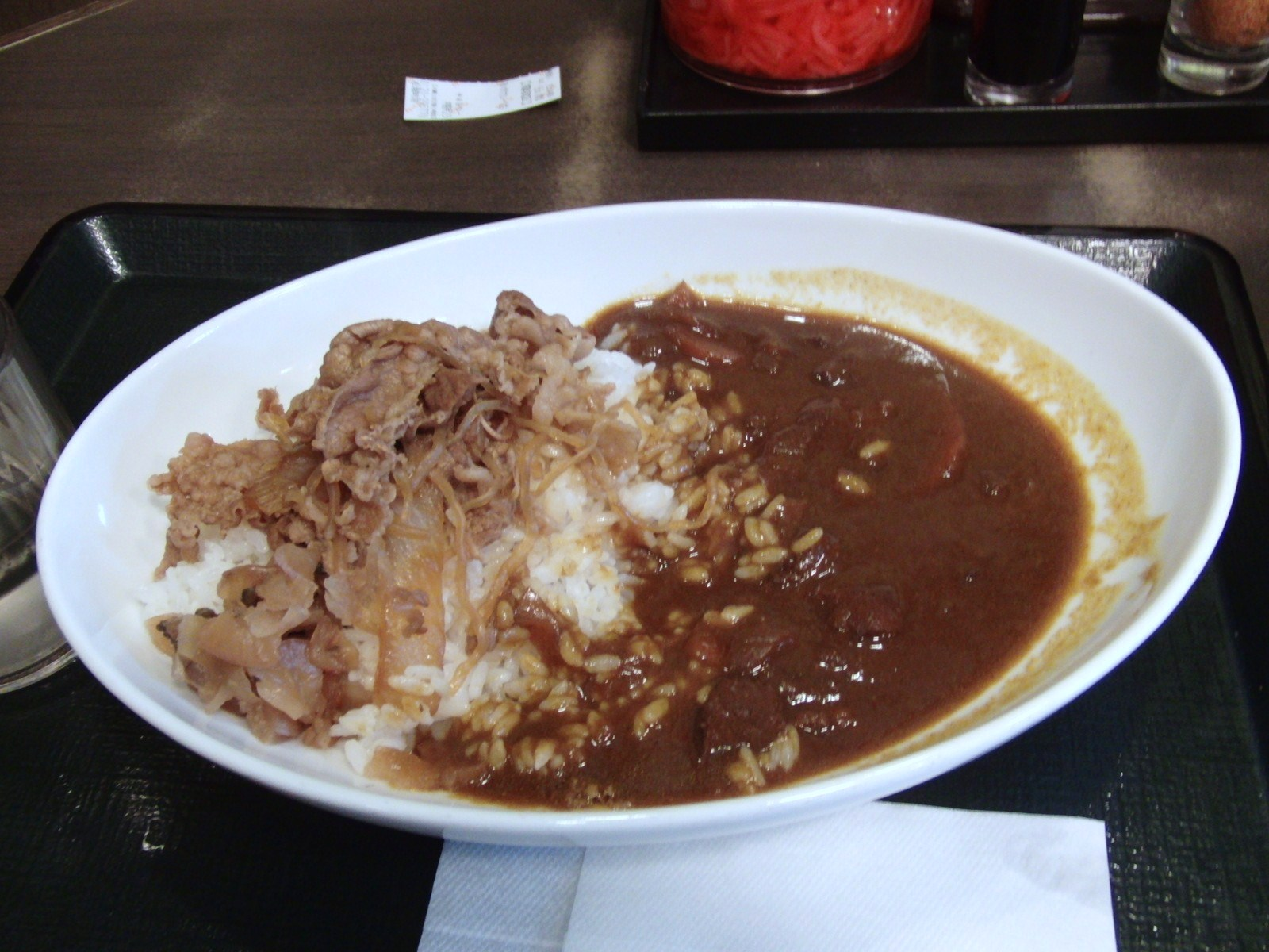 なか卯のあいがけカレーを撮影